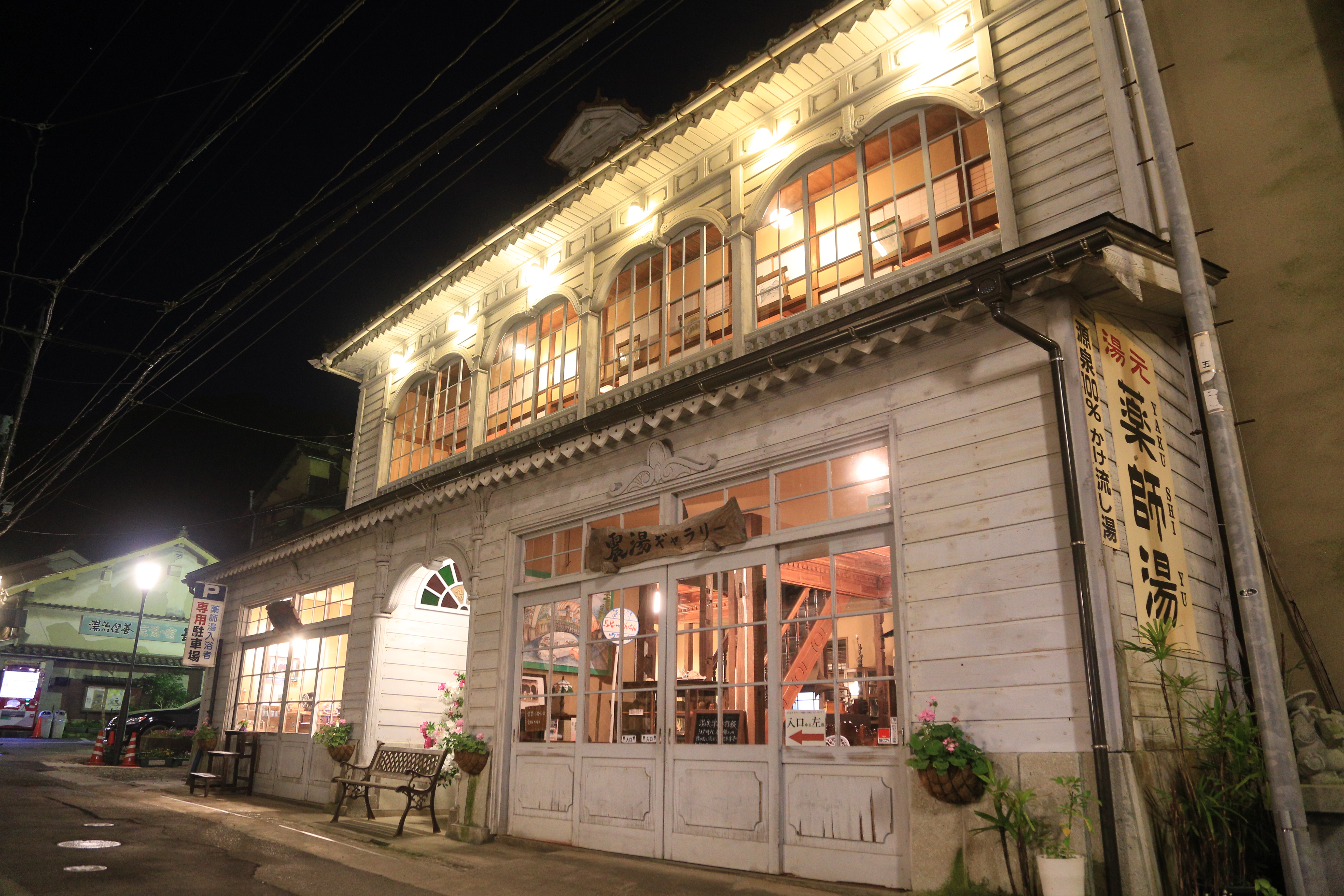 島根県江津市にある温泉津温泉薬師湯の外観